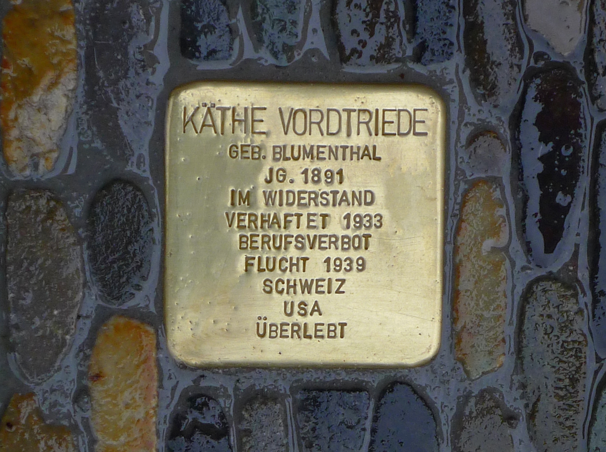 Stolperstein für Käthe Vordtriede vorm Basler Hof (Freiburg)